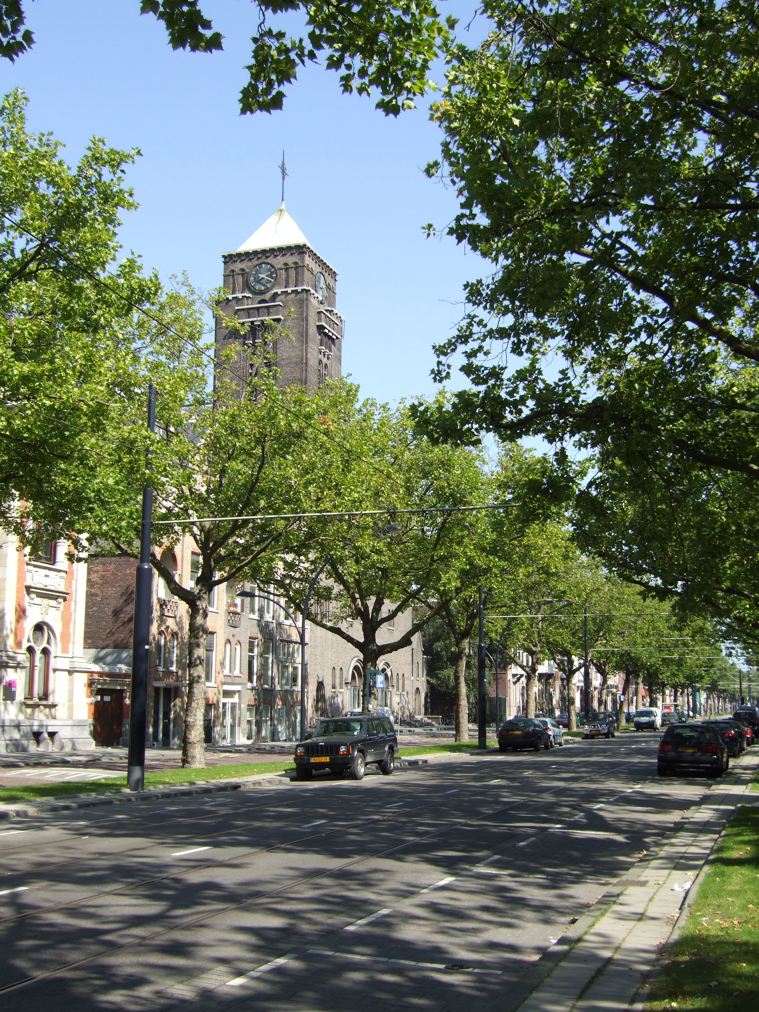 Kathedraal Laurentius en Elisabeth, Rotterdam, 10 september 2006